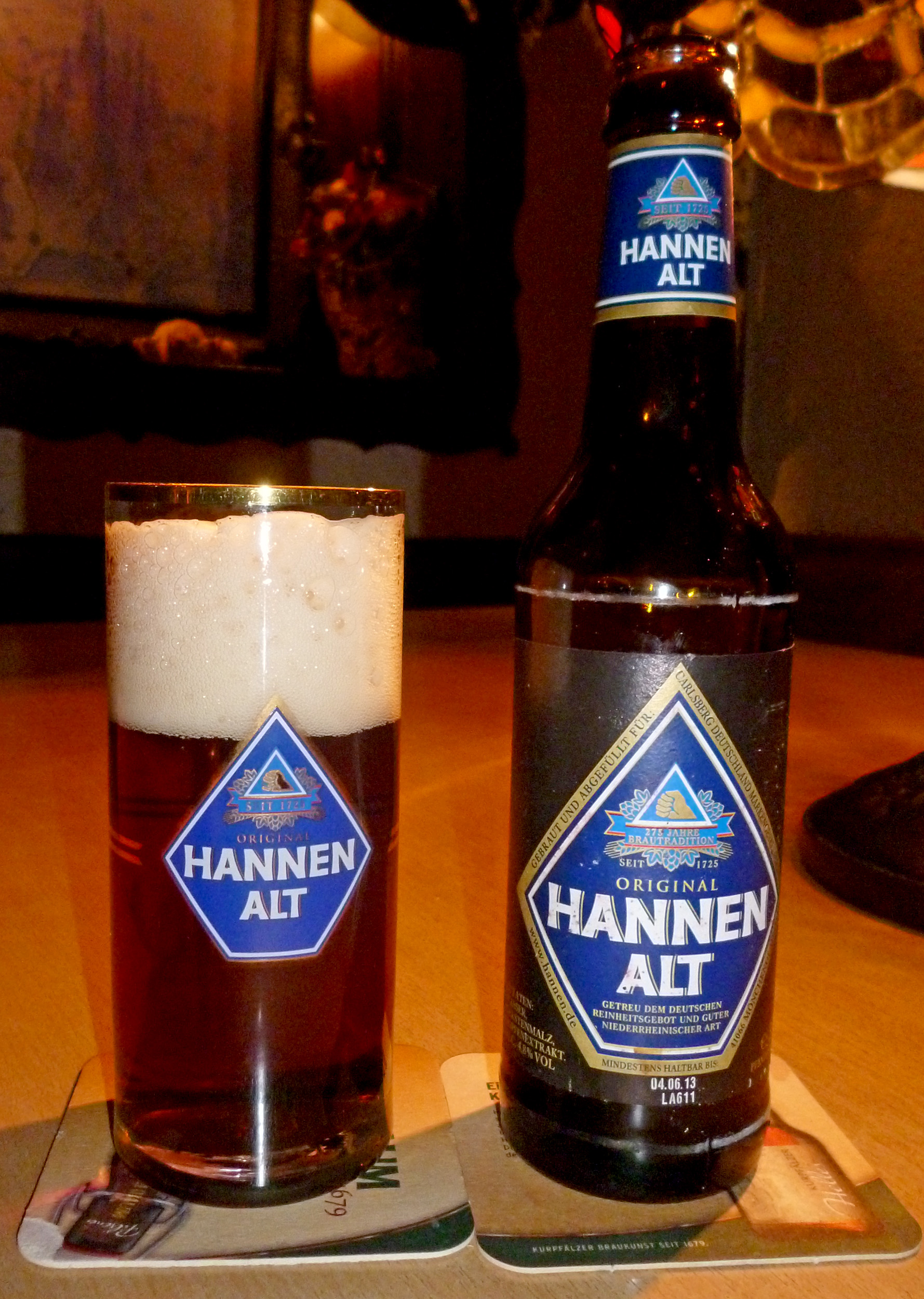 Hannen Alt